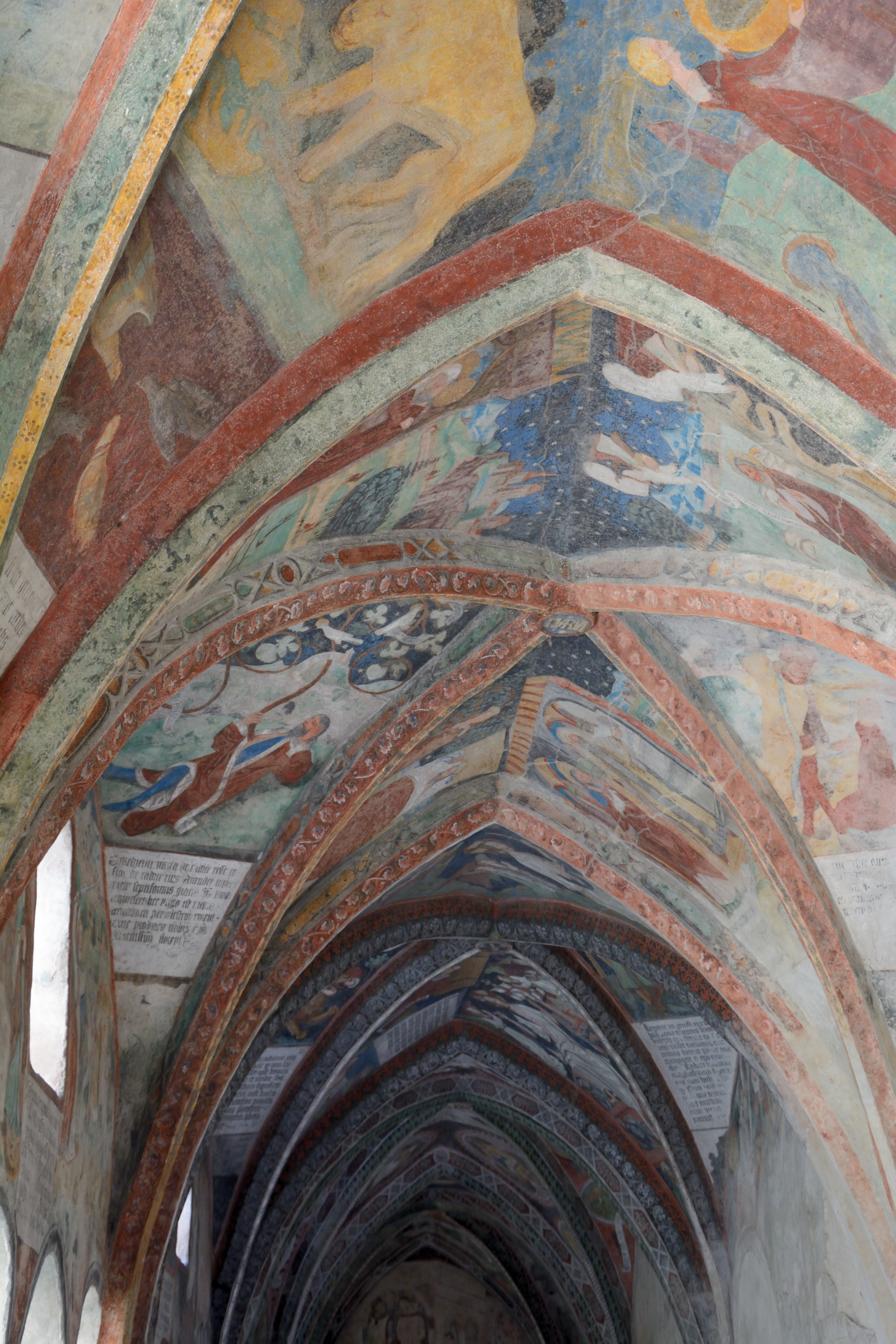 Fresken im Kreuzgang des Brixner Domes an den Gewölben des Westflügels. Im Vordergrund die 6. Arkade, geschaffen vermutlich von Ruprecht Potsch, um 1482. Dahinter die Arkaden 5, 4 und 3.